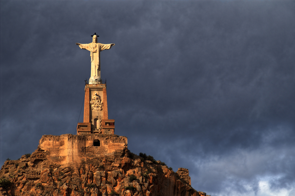 El cristo que corona el Catillo de Monteagudo